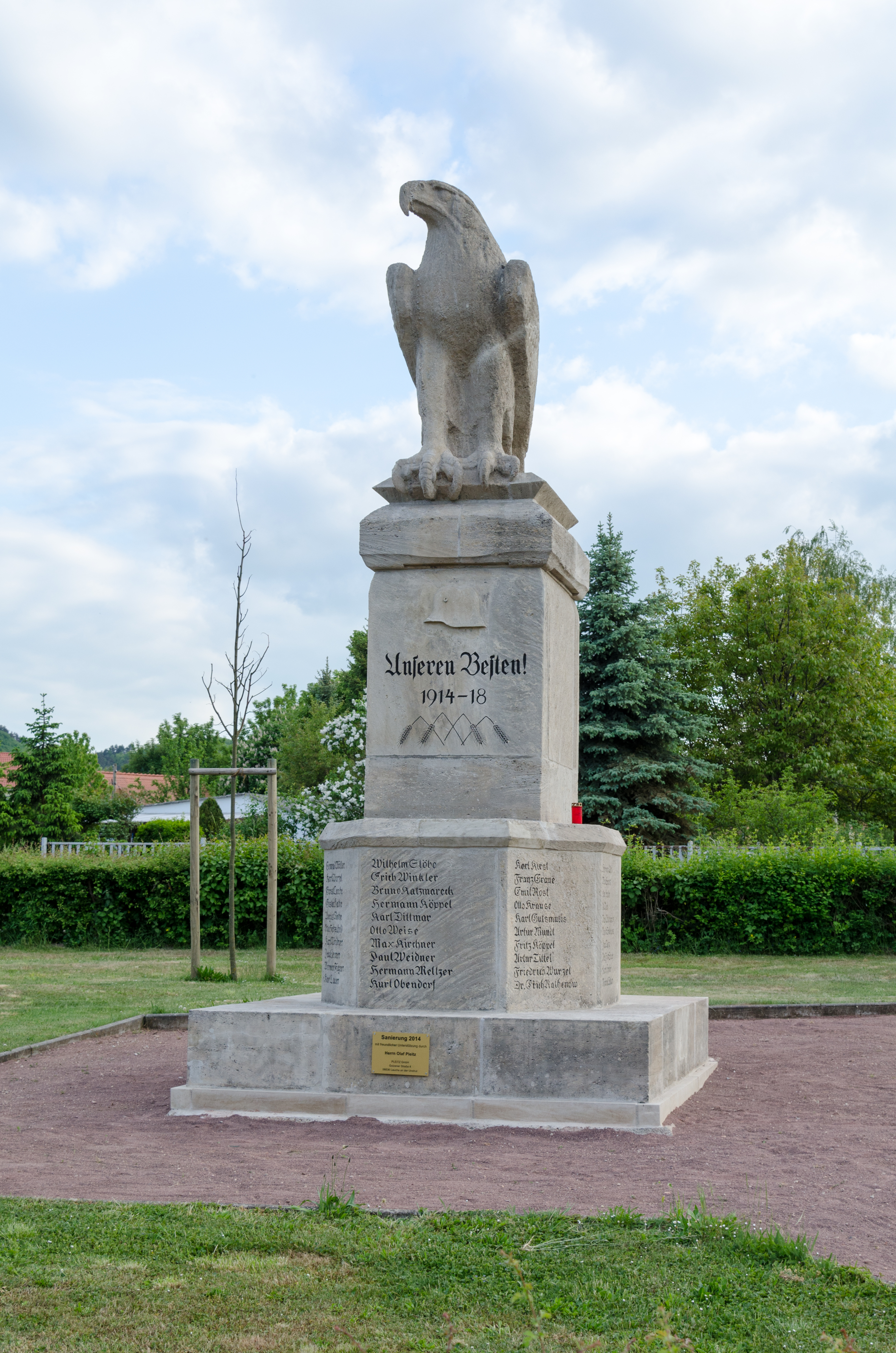 Laucha an der Unstrut, Schützenhausplatz, Kriegerdenkmal